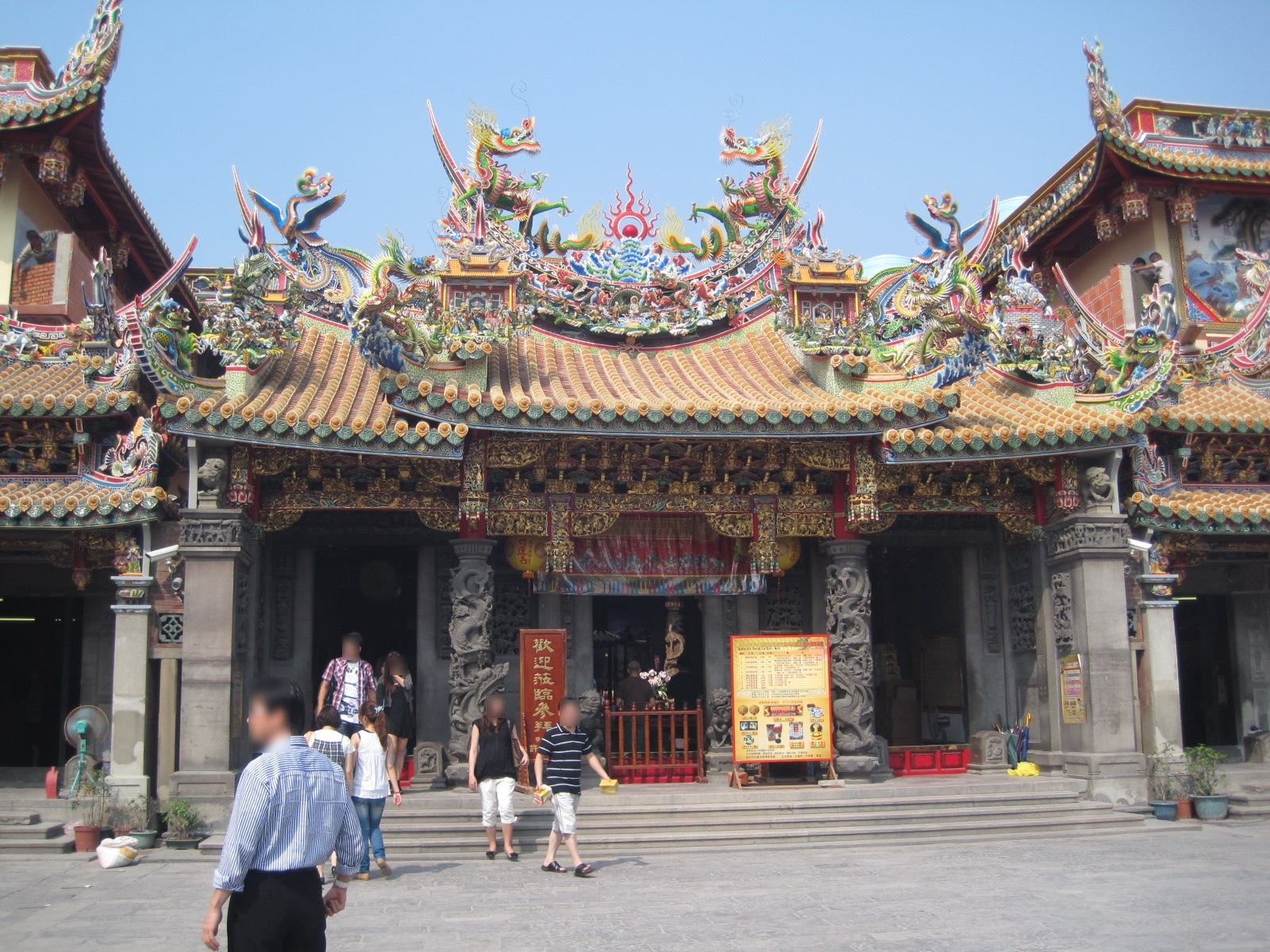 中文（台灣）: 新竹竹蓮寺